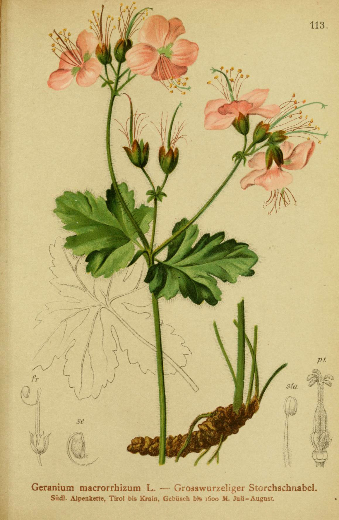 Geranium macrorrhizum L. — Grosswurzeliger Storchschnabel. Südl. Alpenkette, Tirol bis Krain, Geböseh bte 1600 M. Juli-August.